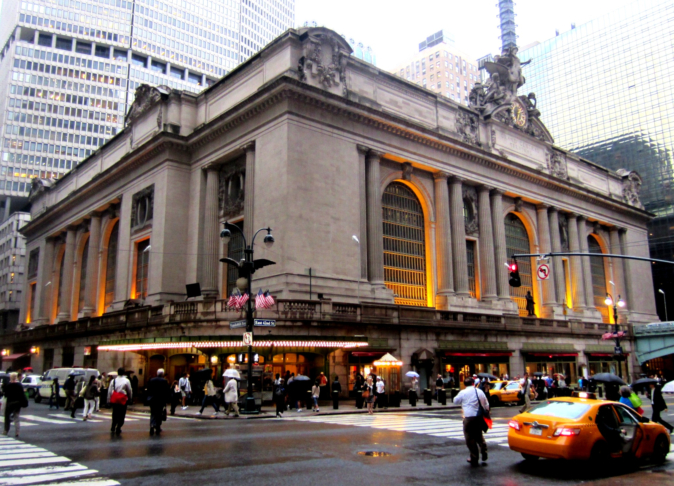 Der Grand Central Terminal an der Ecke 42dn Street Park Avenue